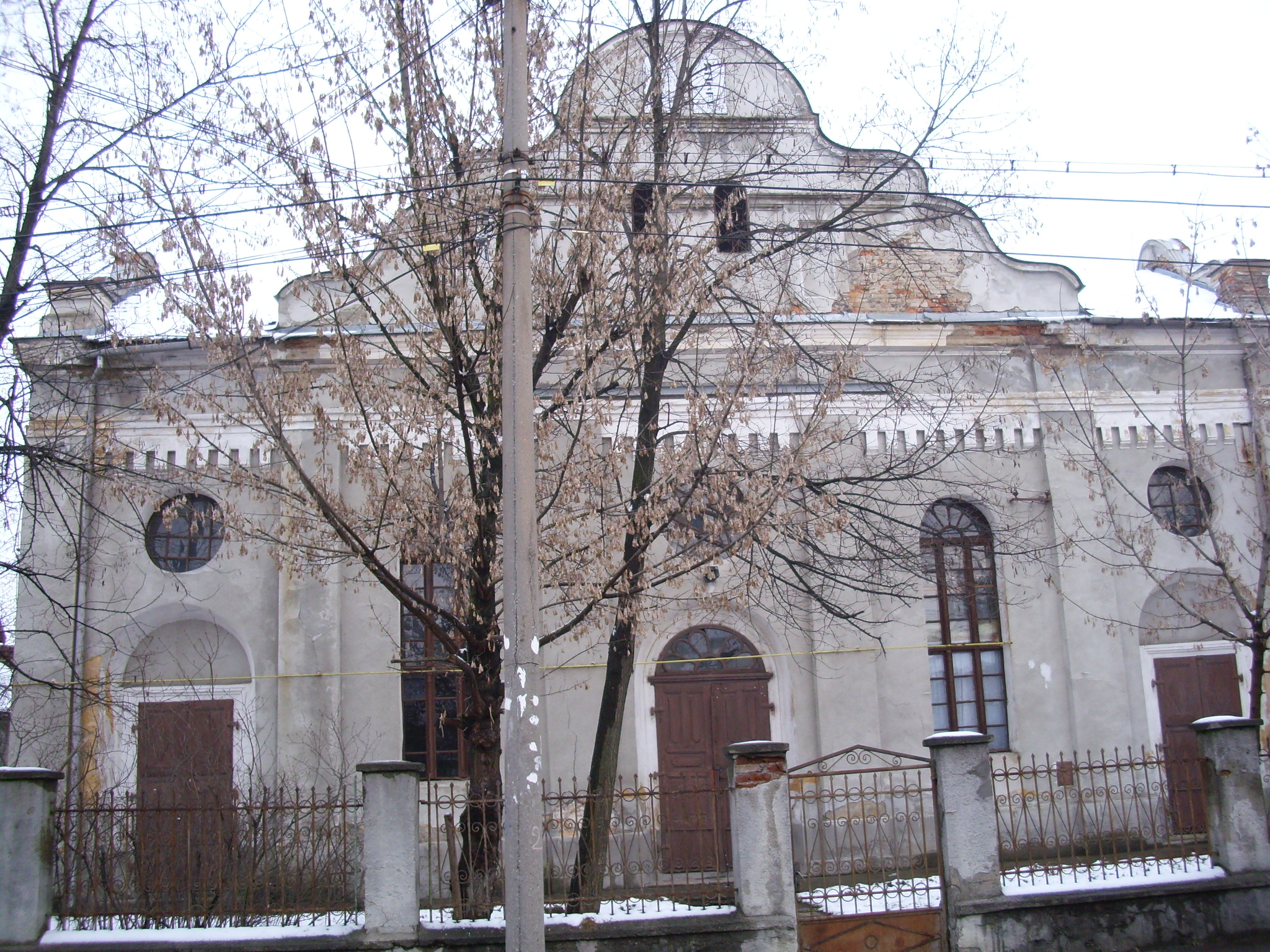 Synagogue, Baia Mare, Romania